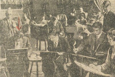 Rajzverseny a budapesti Berzsenyi Dániel Gimnázium Markó utcai épületében (piros nyíllal jelölve Keviczky Kálmán)